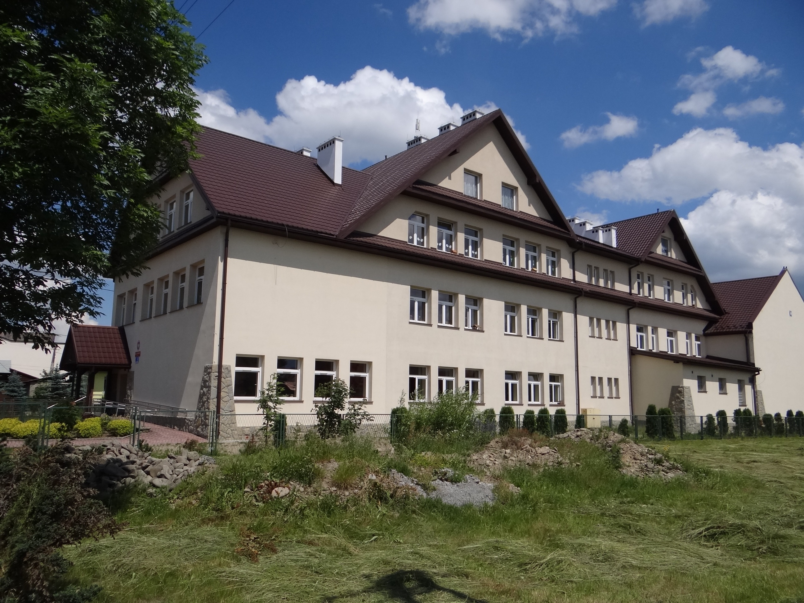 Szkoła w Lasku